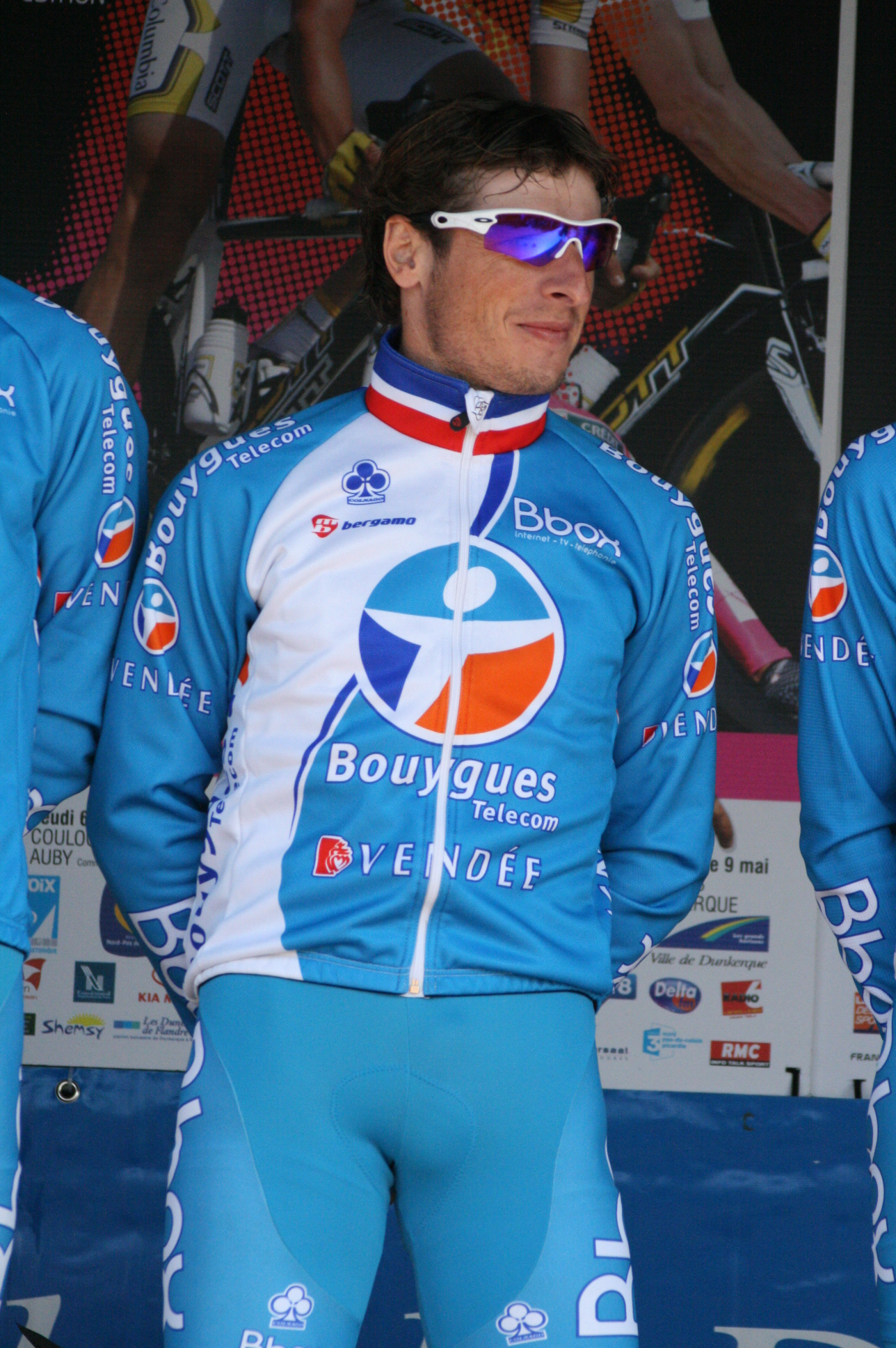 Pierrick Fédrigo, lors de la présentation des équipes des 4 jours de Dunkerque 2010